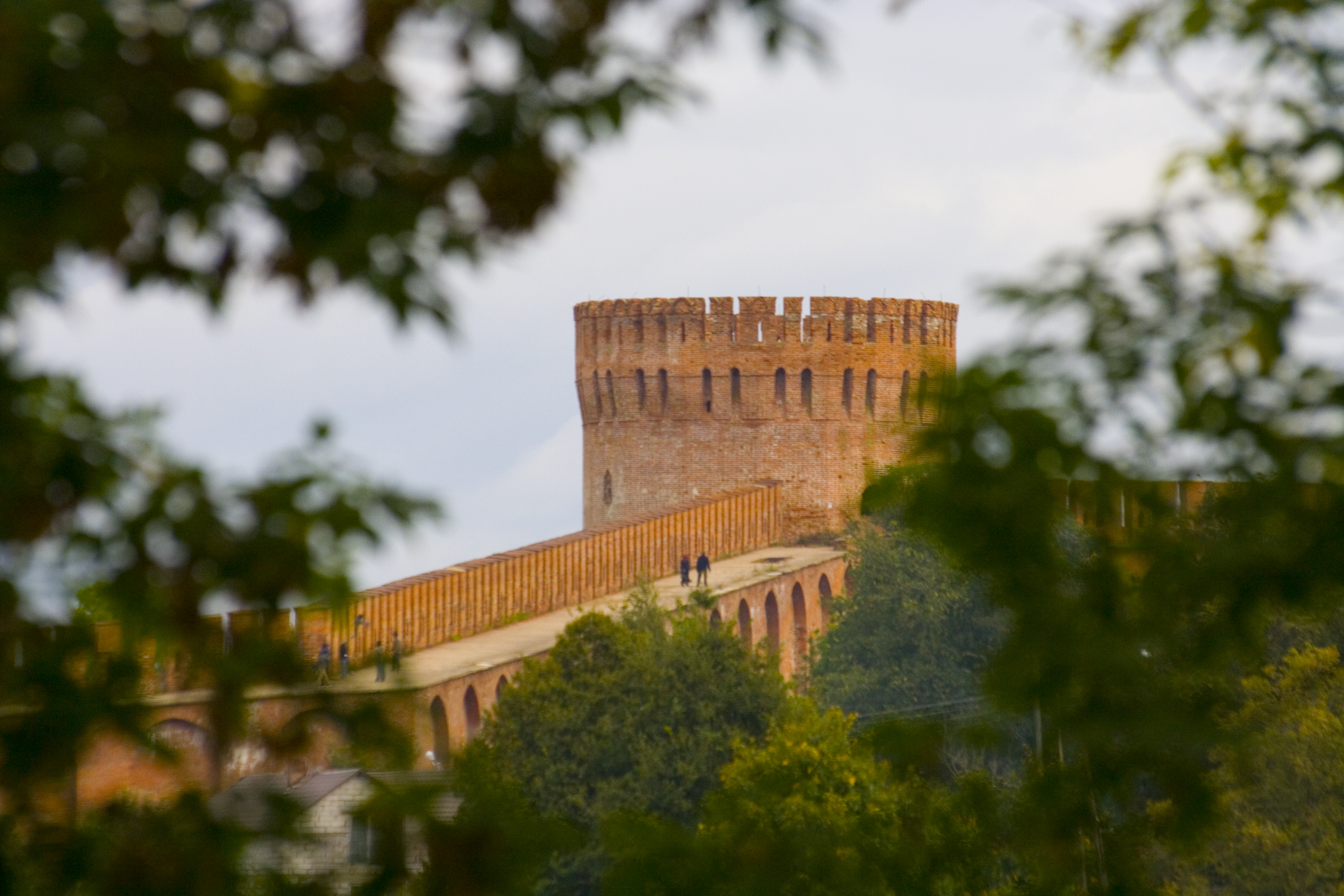 Вид на Смоленский кремль